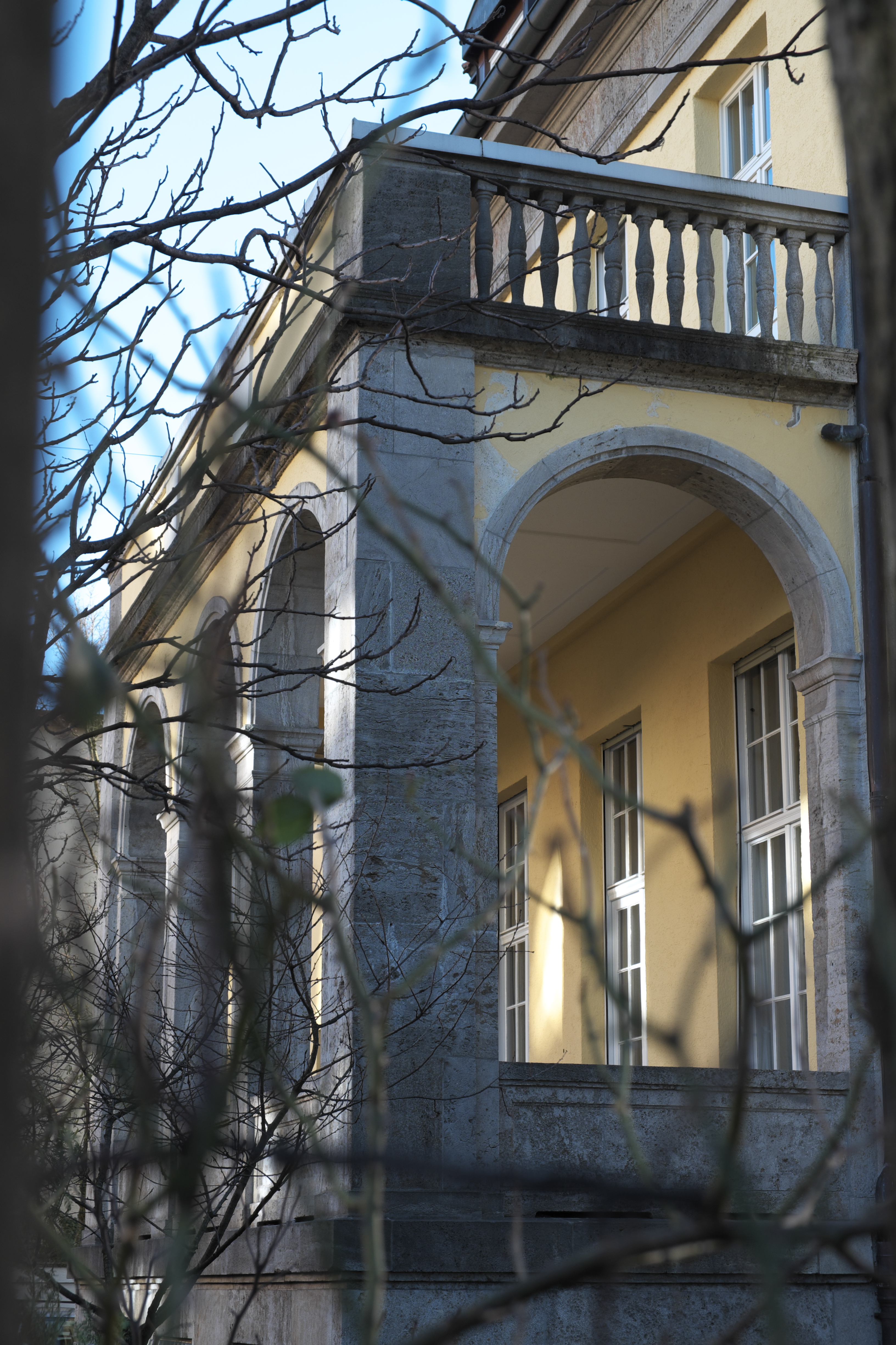 Villa am Bavariaring 37 in der Ludwigsvorstadt im Stadtbezirk Ludwigsvorstadt-Isarvorstadt in München (Bayern/Deutschland), 1912/13 von Heilmann & Littmann erbaut; im Norden vorgebaute Arkadenloggia